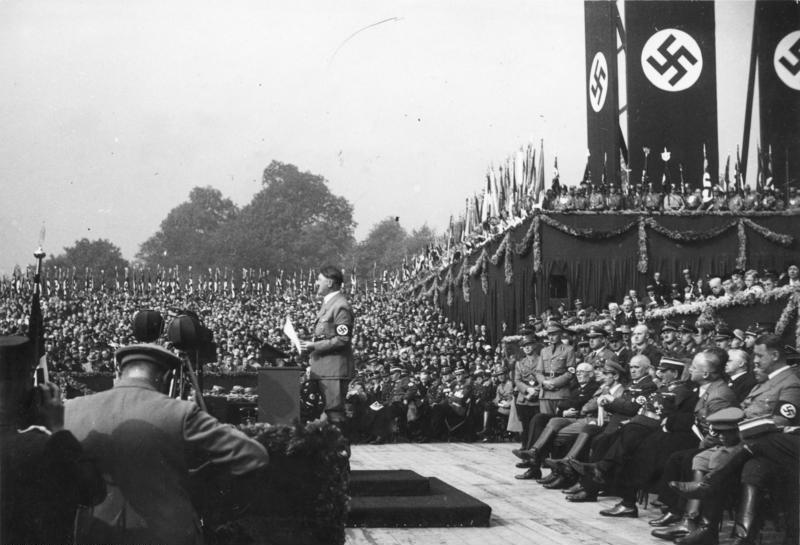 München, Haus der deutschen Kunst, Hitler Scherl Bilderdienst: Grundsteinlegung des Hauses der deutschen Kunst. Der Führer spricht [München.- Grundsteinlegung zum "Haus der deutschen Kunst" am 15.10.1933, Rede von Adolf Hitler] Abgebildete Personen: Hitler, Adolf: Reichskanzler, Deutschland